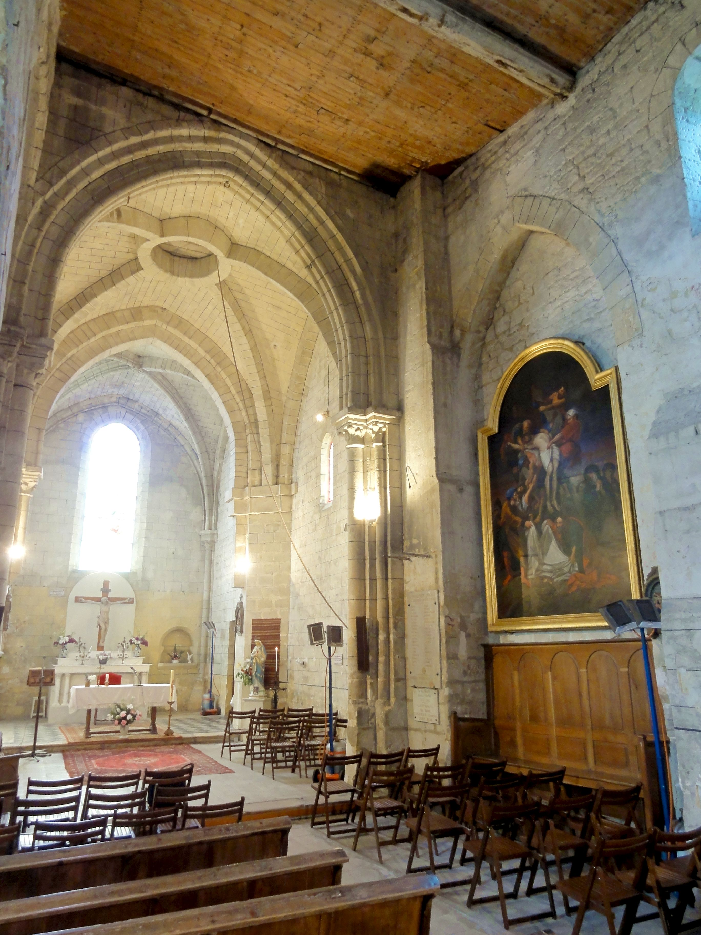 Nef, vue vers l'est.